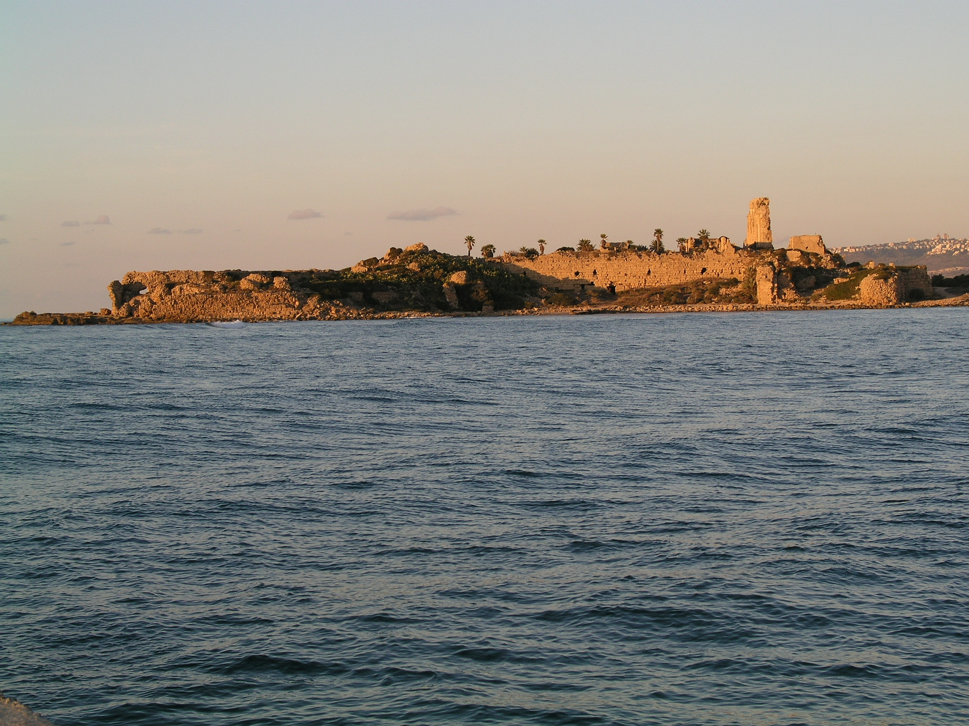 atlit